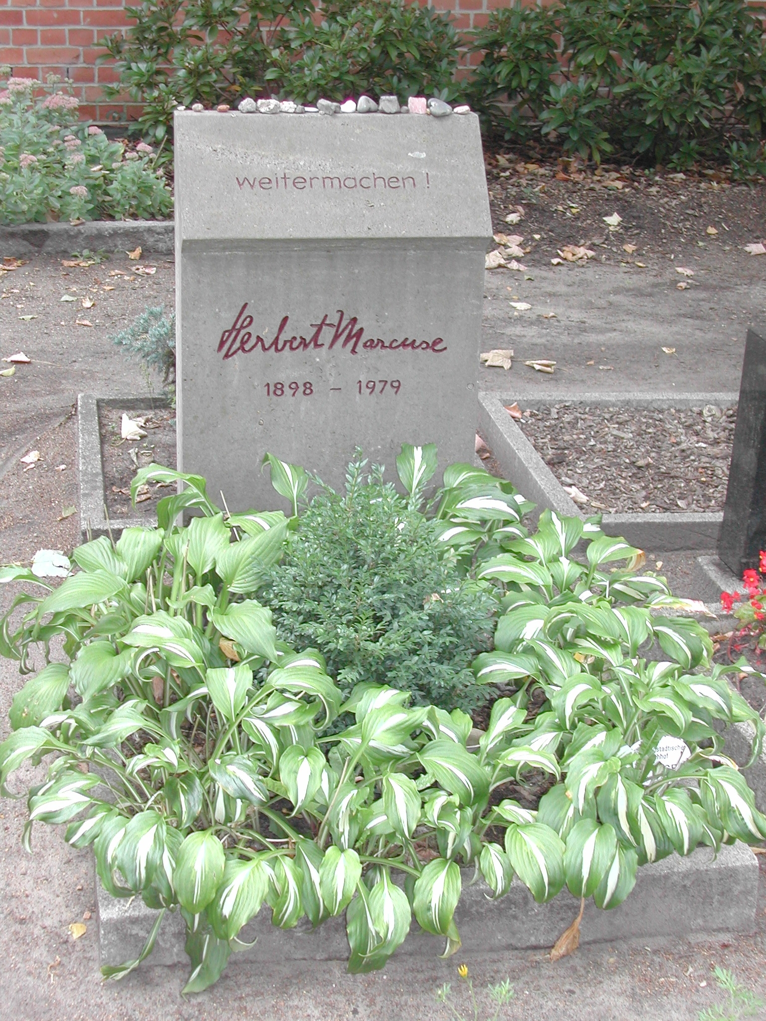 Tomba di Herbert Marcuse al Dorotheenstädtischer Friedhof